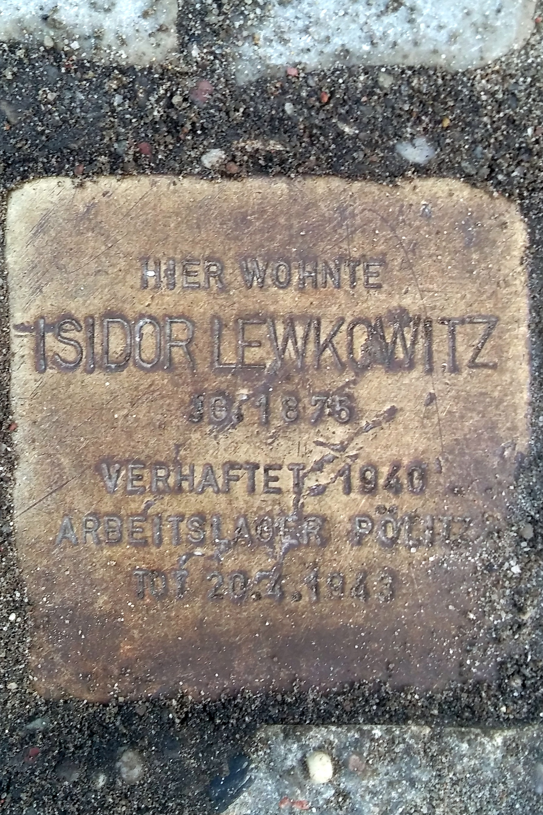 Stralsund, Sarnowstraße 26, Stolperstein Isidor Lewkowitz